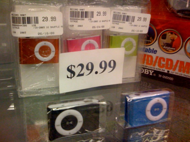 Fake iPod shuffle